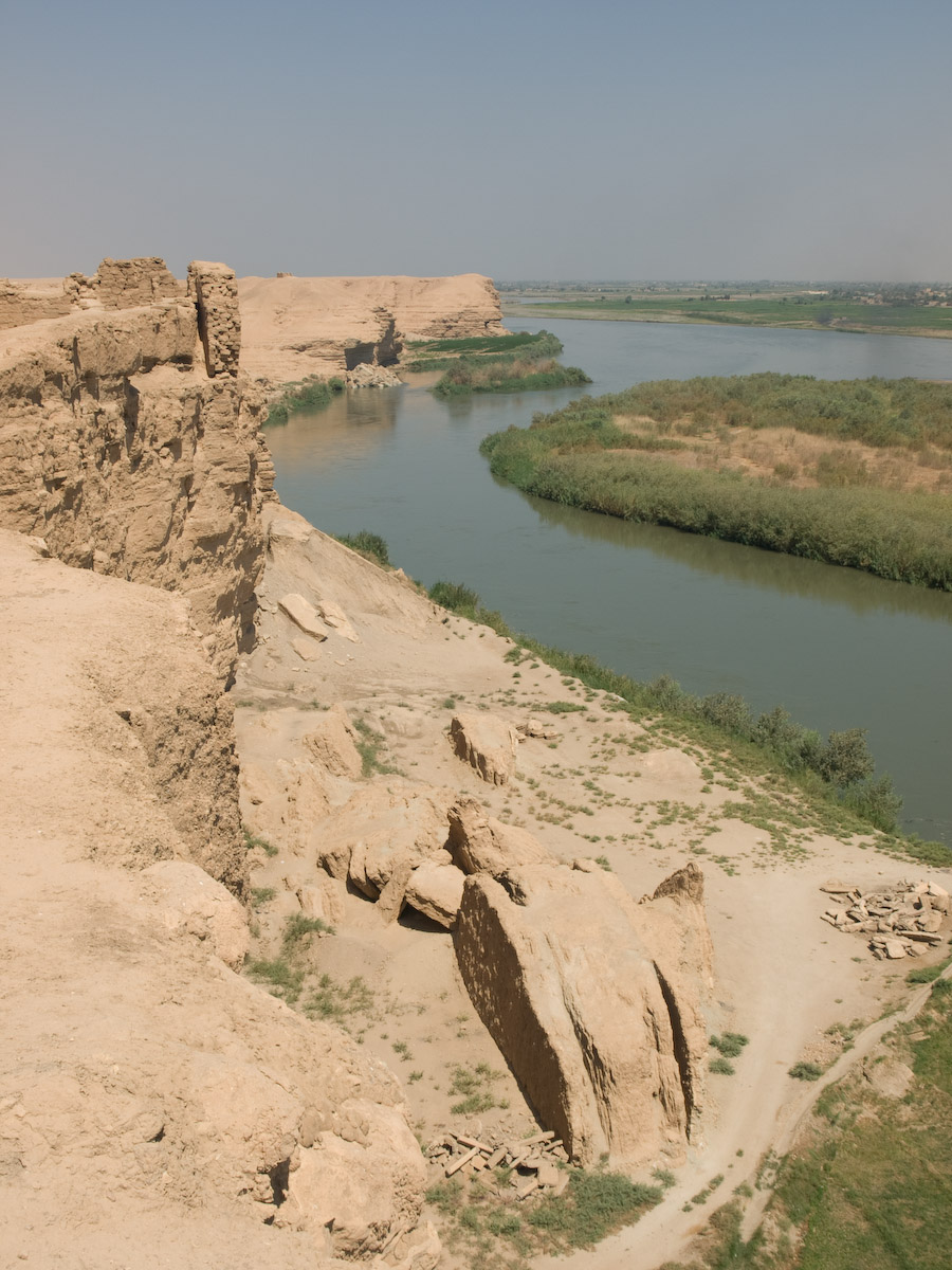 L'Euphrate à hauteur de la citadelle de Doura Europos.